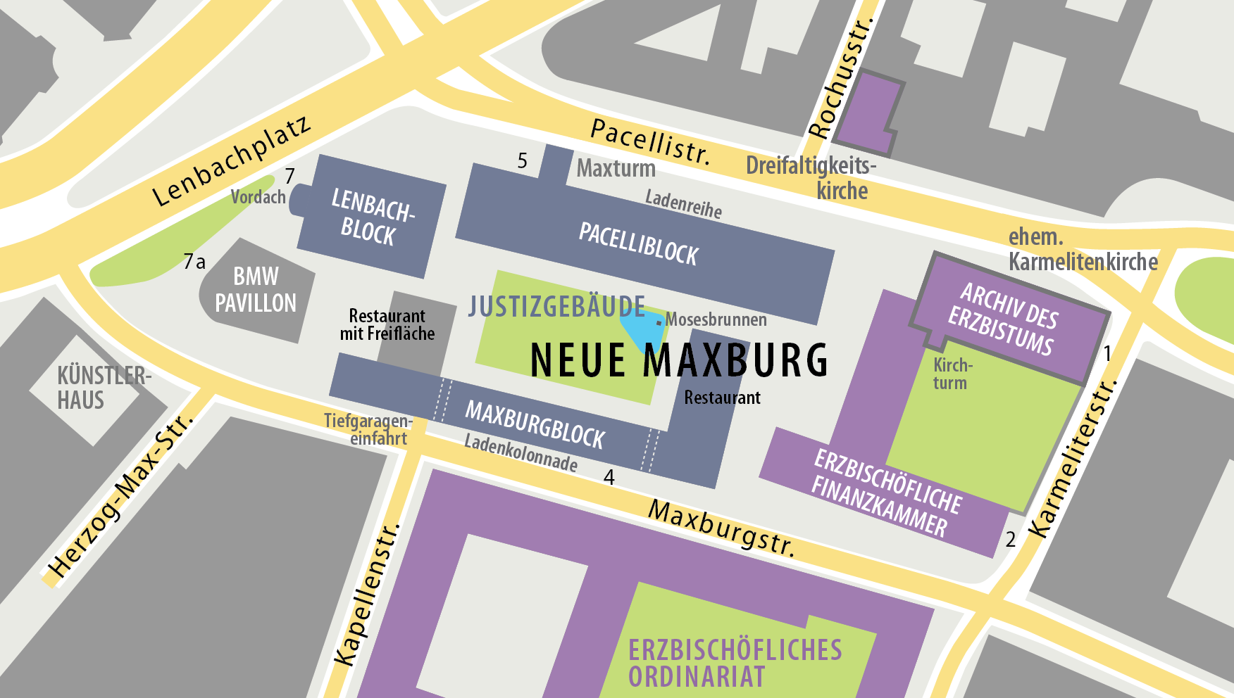 Übersichtsplan der Maxburg in München